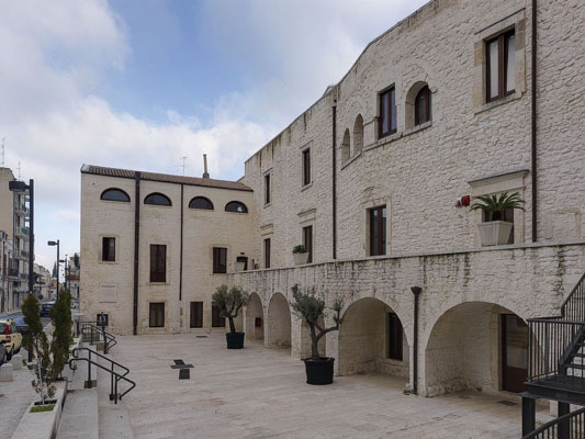 Palazzo Monacelle, ex Palazzo De Bellis, attuale biblioteca comunale